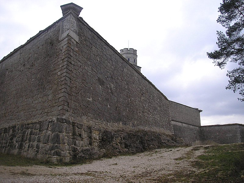 Willibaldsburg über Eichstätt (Oberbayern). Die Festungswerke vor dem Hauptbau. Eigene Aufnahme, Dez. 2006 / Willibaldsburg castle above Eichstätt (Upper Bavaria, Germany). Fortifications in front of the main building. Own photo, Dec. 2006